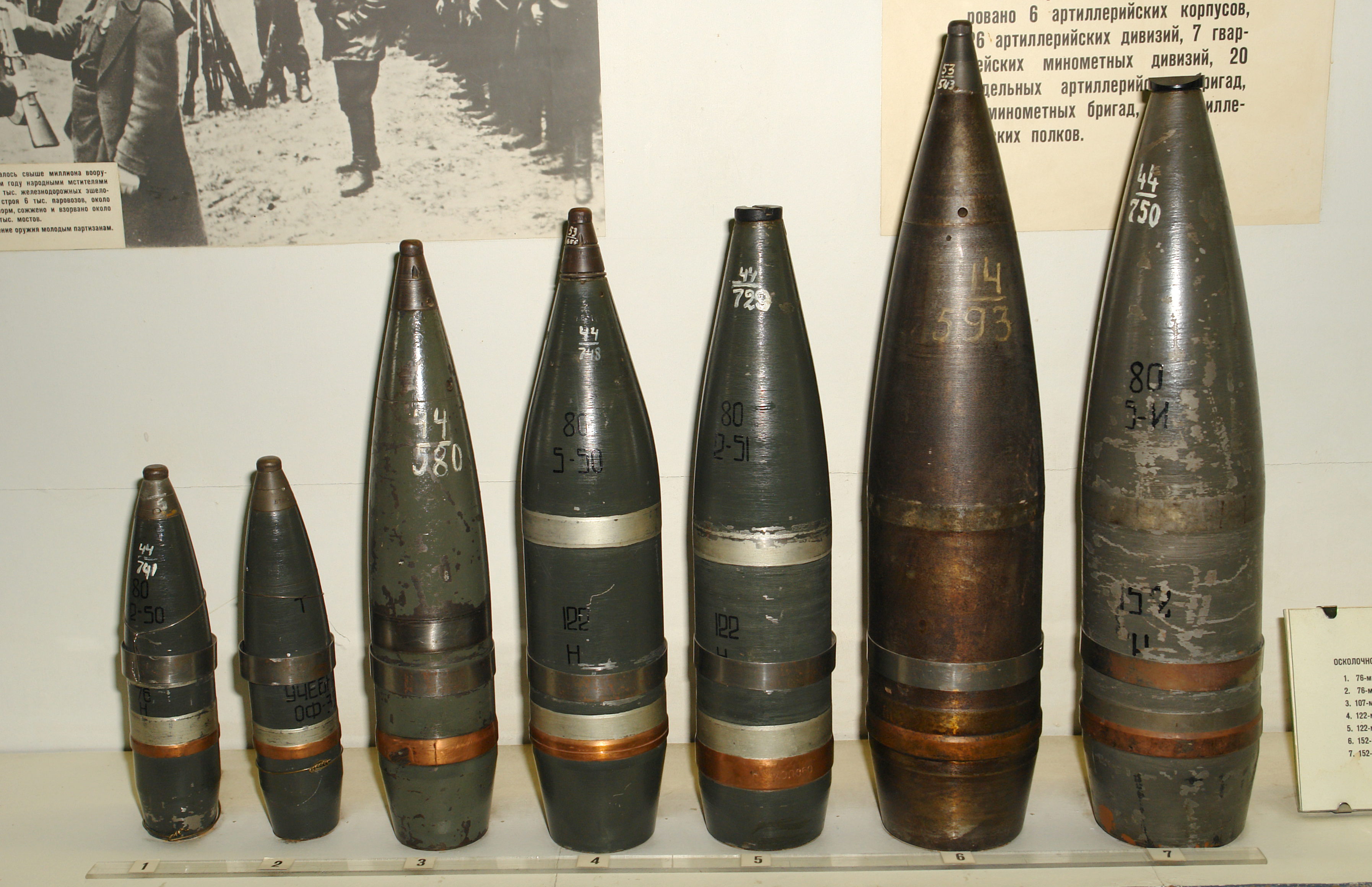 ОСКОЛОЧНО-ФУГАСНЫЕ ДАЛЬНОБОЙНЫЕ ГРАНАТЫ I 1. 76-мм —6,2 кг. 2. 76-мм — 6,2 кг (с привинтной головкой). 3. 107-мм —17,2 кг (с привинтной головкой). 4. 122-мм—21,76 кг (гаубичная). 5. 122-мм —25 кг (пушечная). 6. 152-мм—40 кг (гаубичная). 7. 152-мм—43,56 кг (пушечная). Военно-исторический музей артиллерии, инженерных войск и войск связи, Санкт-Петербург.